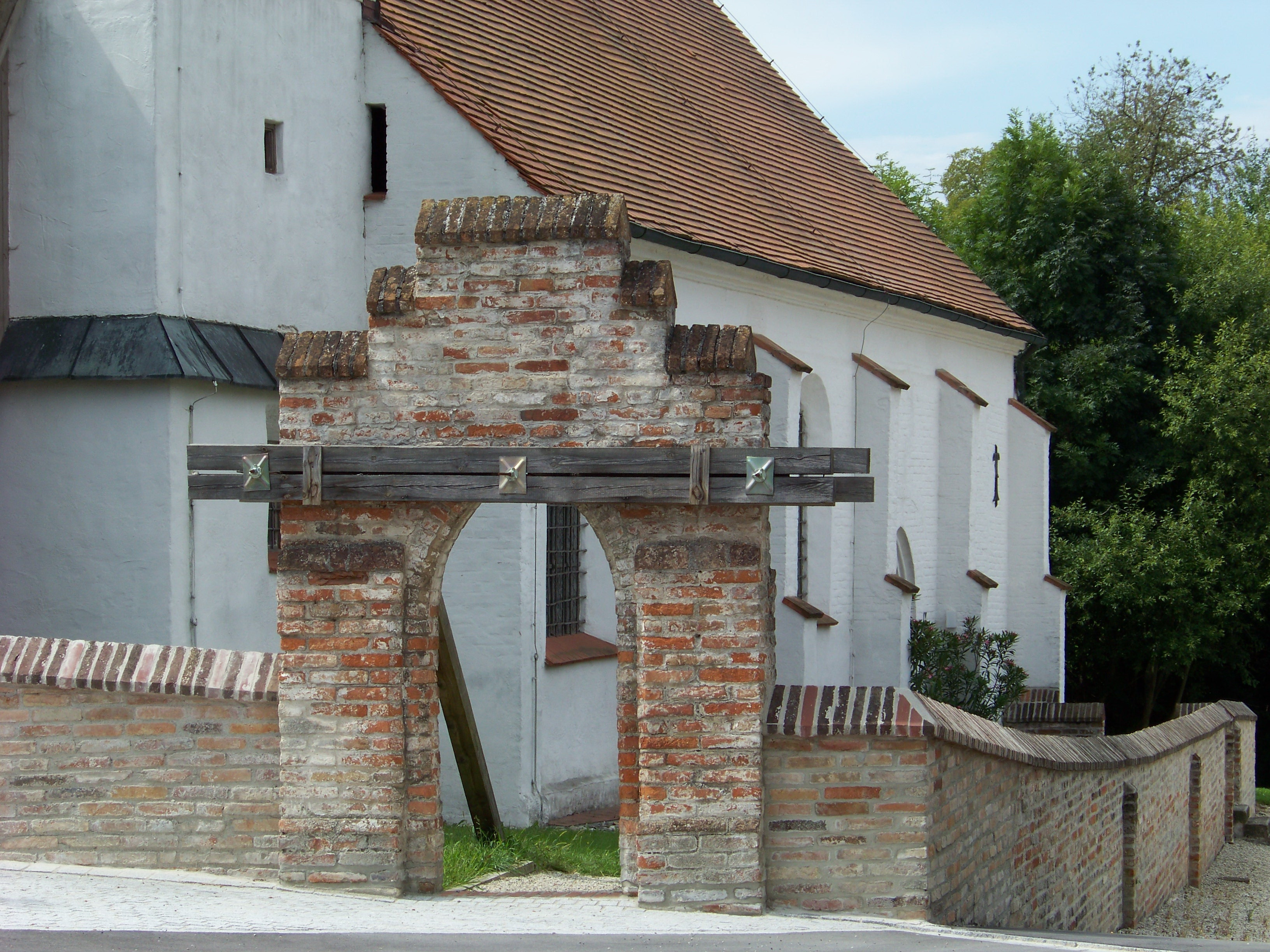 Adlkofen, Jenkofen 13. Katholische Kirche Mariä Himmelfahrt und Friedhofsmauer. Staffelhalle mit eingezogenem Chor, nördlich Chorflankenturm, fünfgeschossig, mit Spitzbogenblenden und Zwiebelhaube, Gliederung durch Dreiecklisenen und Dachfries am Chor sowie abgesetzte Streben am Langhaus, mit profilierten Spitzbogenportalen an Süd-, Nord- und Westseite, spätgotisch, erste Hälfte 15. Jahrhundert; mit Ausstattung; Friedhofsmauer mit zwei Toren, jeweils spitzbogiger Tordurchlass mit steilem Treppengiebel, Ziegelstein, wohl gleichzeitig. Im Bild das Osttor.